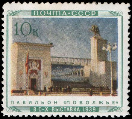 Почтовая марка СССР из серии «Всесоюзная сельскохозяйственная выставка в Москве», выпущенная в октябре 1940 года. На марке изображён павильон «Поволжье», справа виден человек на коне на высоком постаменте — памятник В. И. Чапаеву работы скульптора П. Баландина. Автор цветной фотографии — Владислав Микоша. Номер (ЦФА) — 751. Тираж — 2 млн экз.